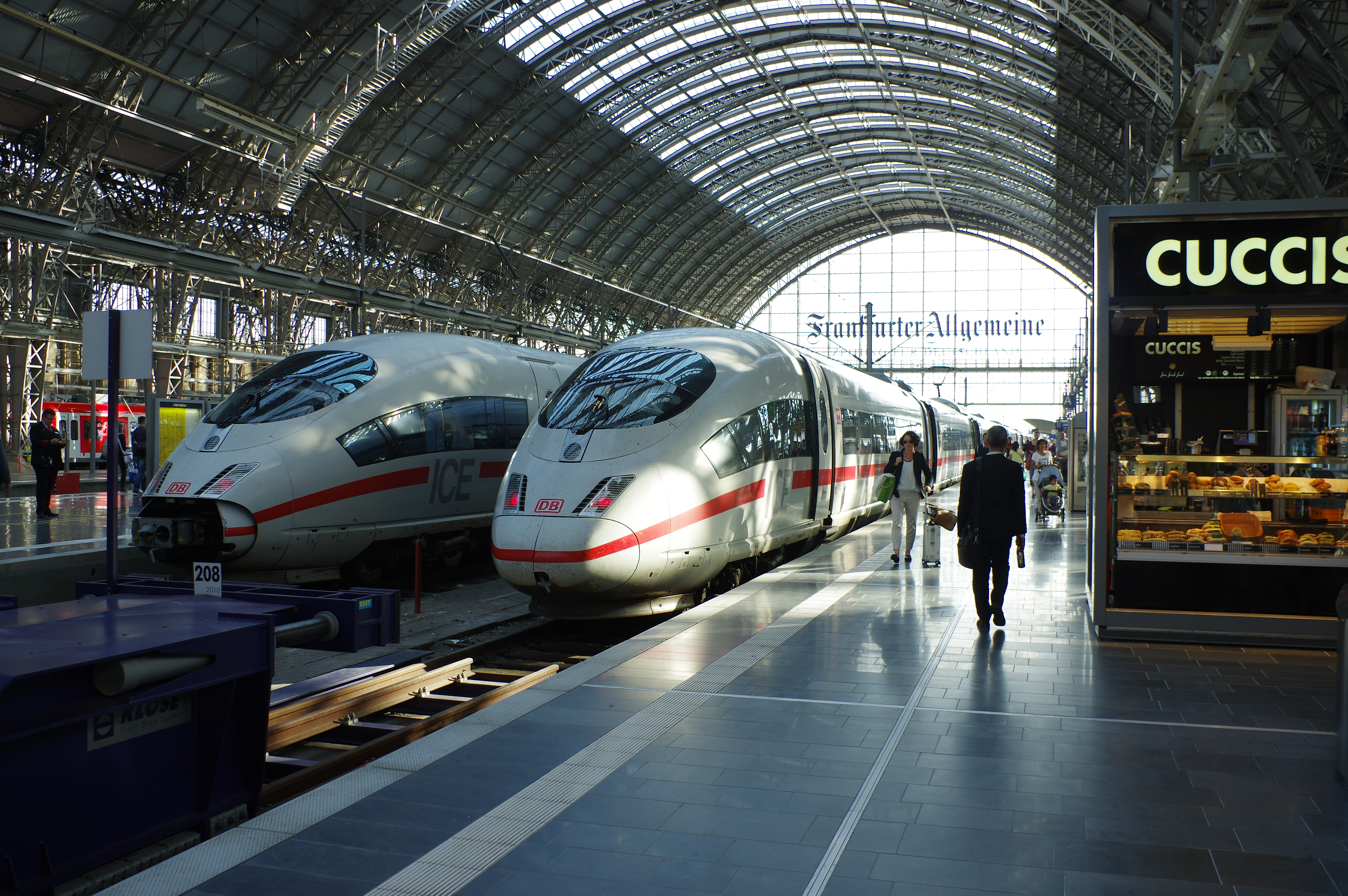 Frankfurt am Main, Hauptbahnhof